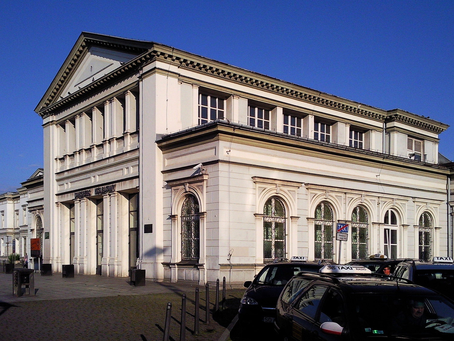 Sosnowiec. Fragment dworca kolejowego Sosnowiec Główny